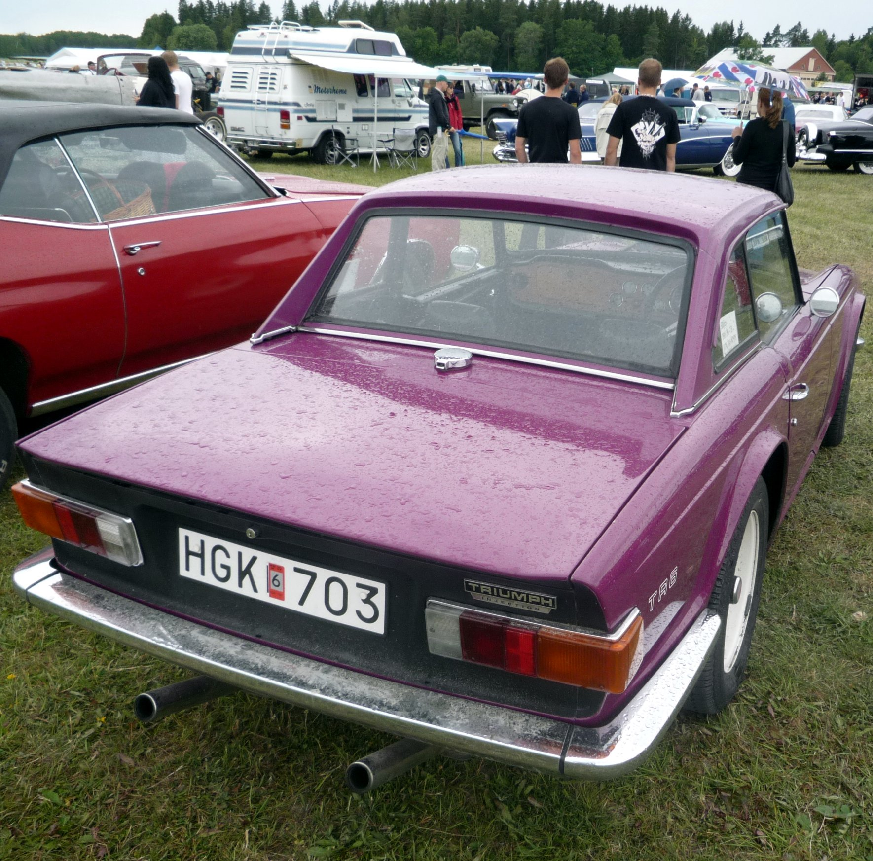 Purple Triumph TR6